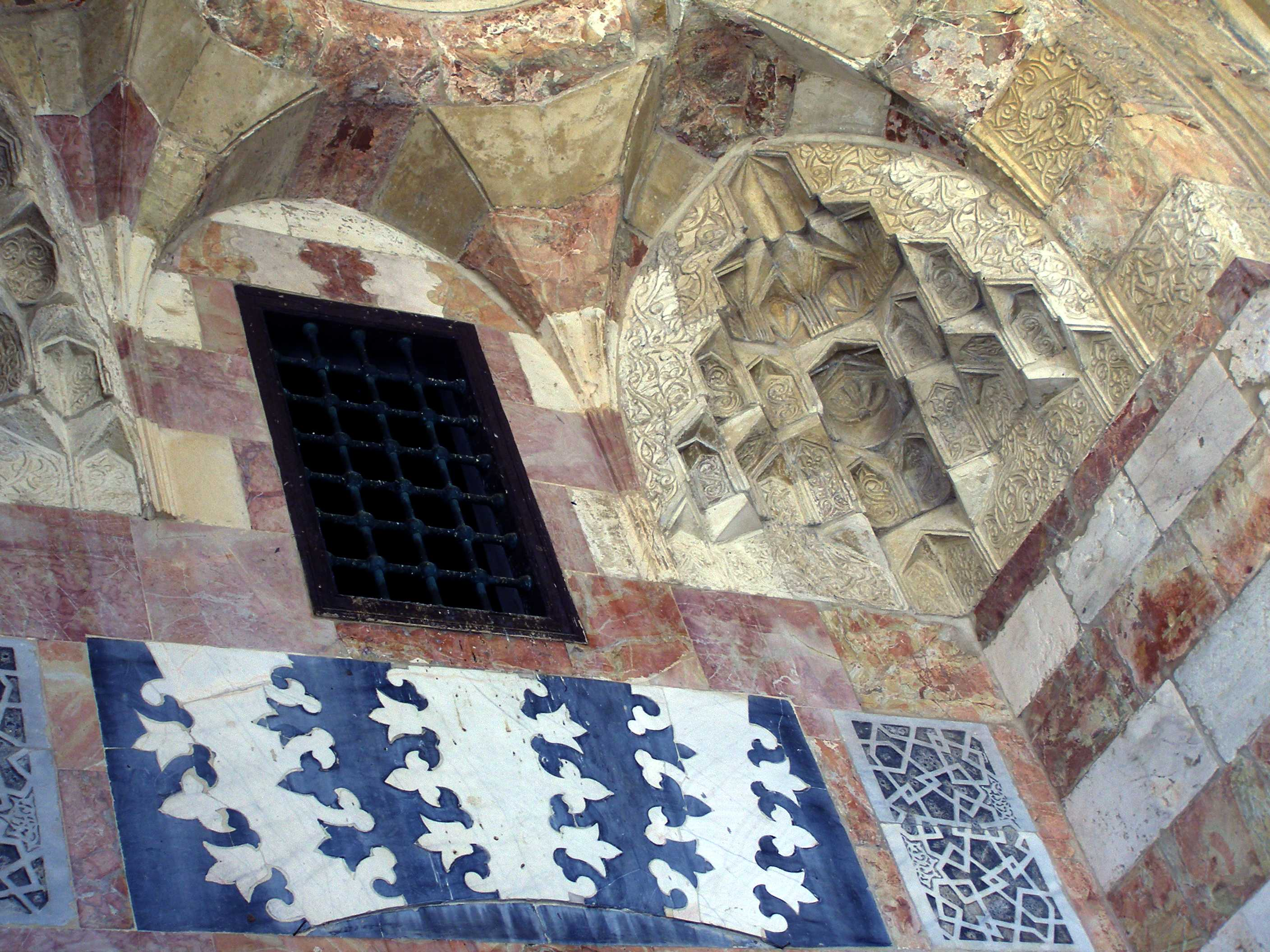 Temple Mount, Jerusalem Madrassat Al Ashraffiyya